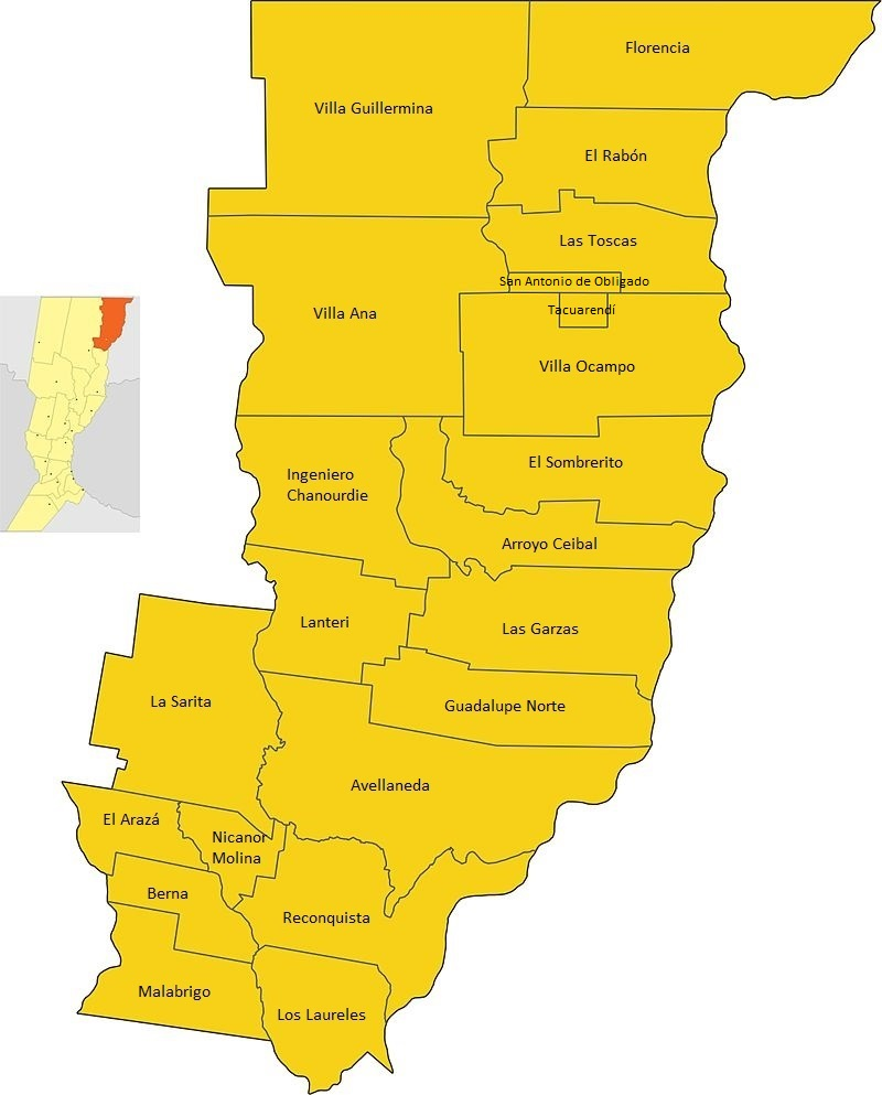 Distritos del Departameno General Obligado